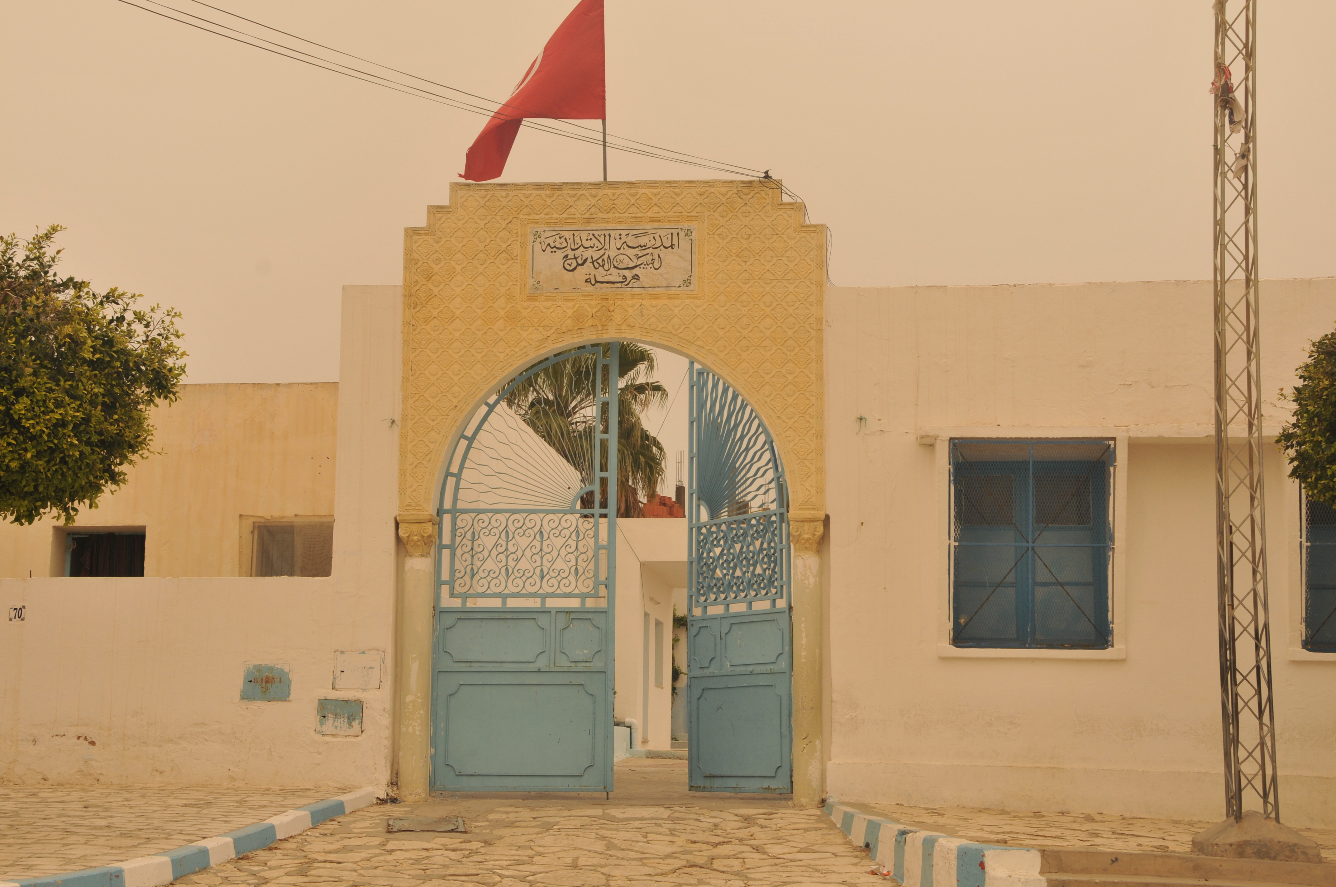 Ecole Primaire 'Habib El Kamel' à Hergla, Tunisie